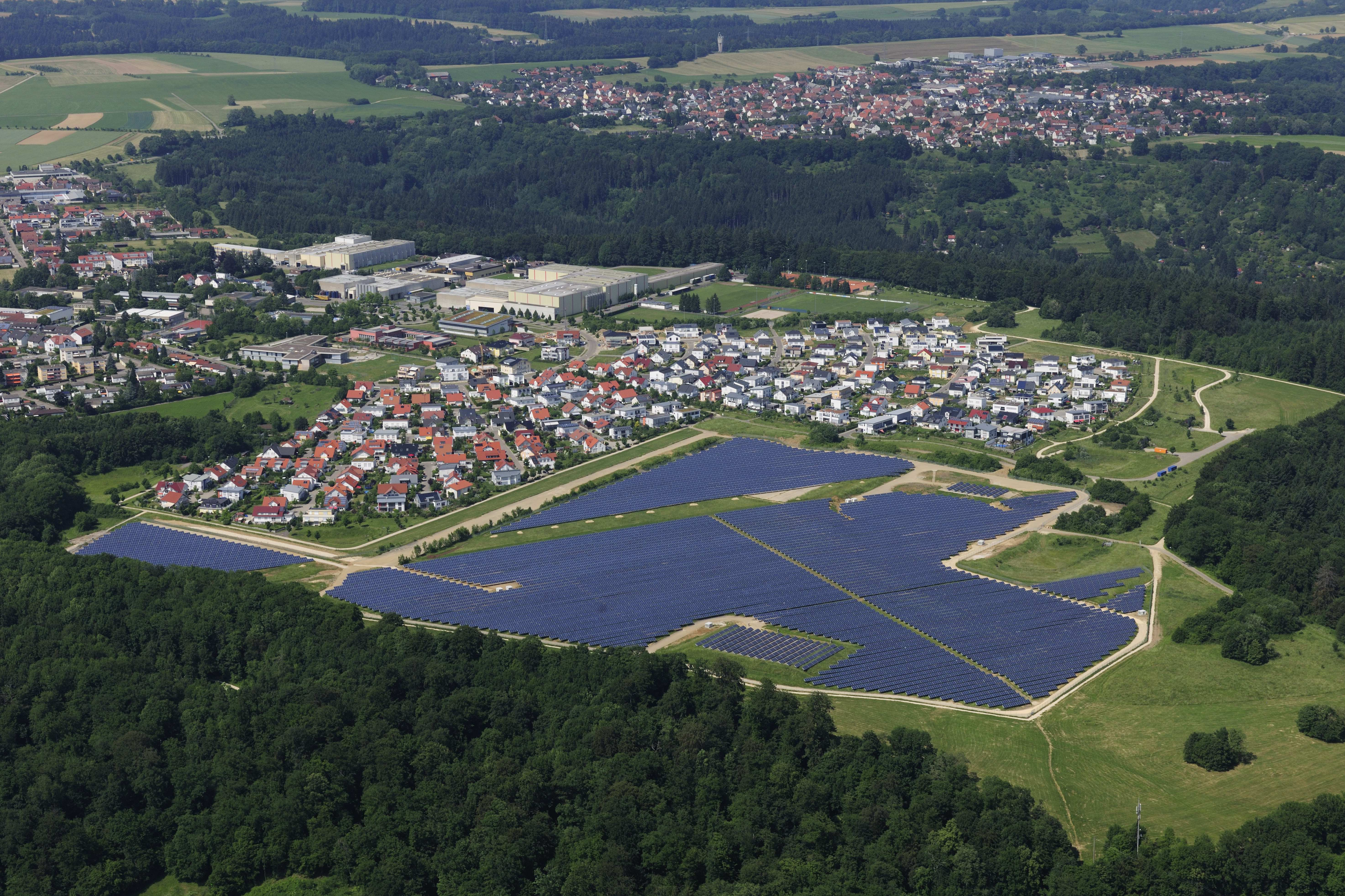 Der Solarpark der Stadtwerke Schwäbisch Gmünd auf der Mutlanger Heide.